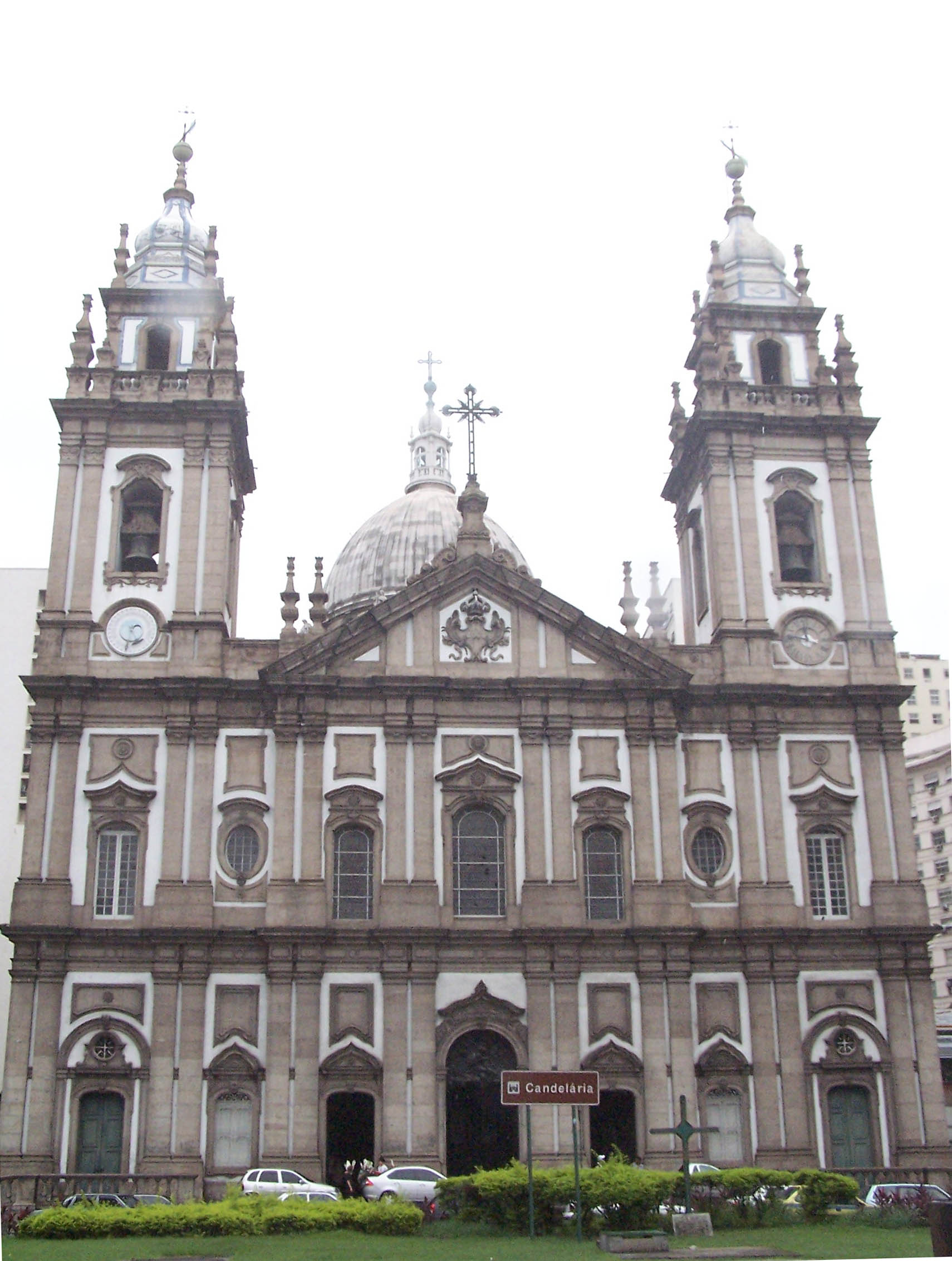 Façade of Igreja da Candelária, Rio de Janeiro, Brazil.